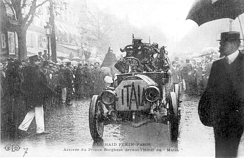 L'equipaggio della Itala arriva alla sede del Matin